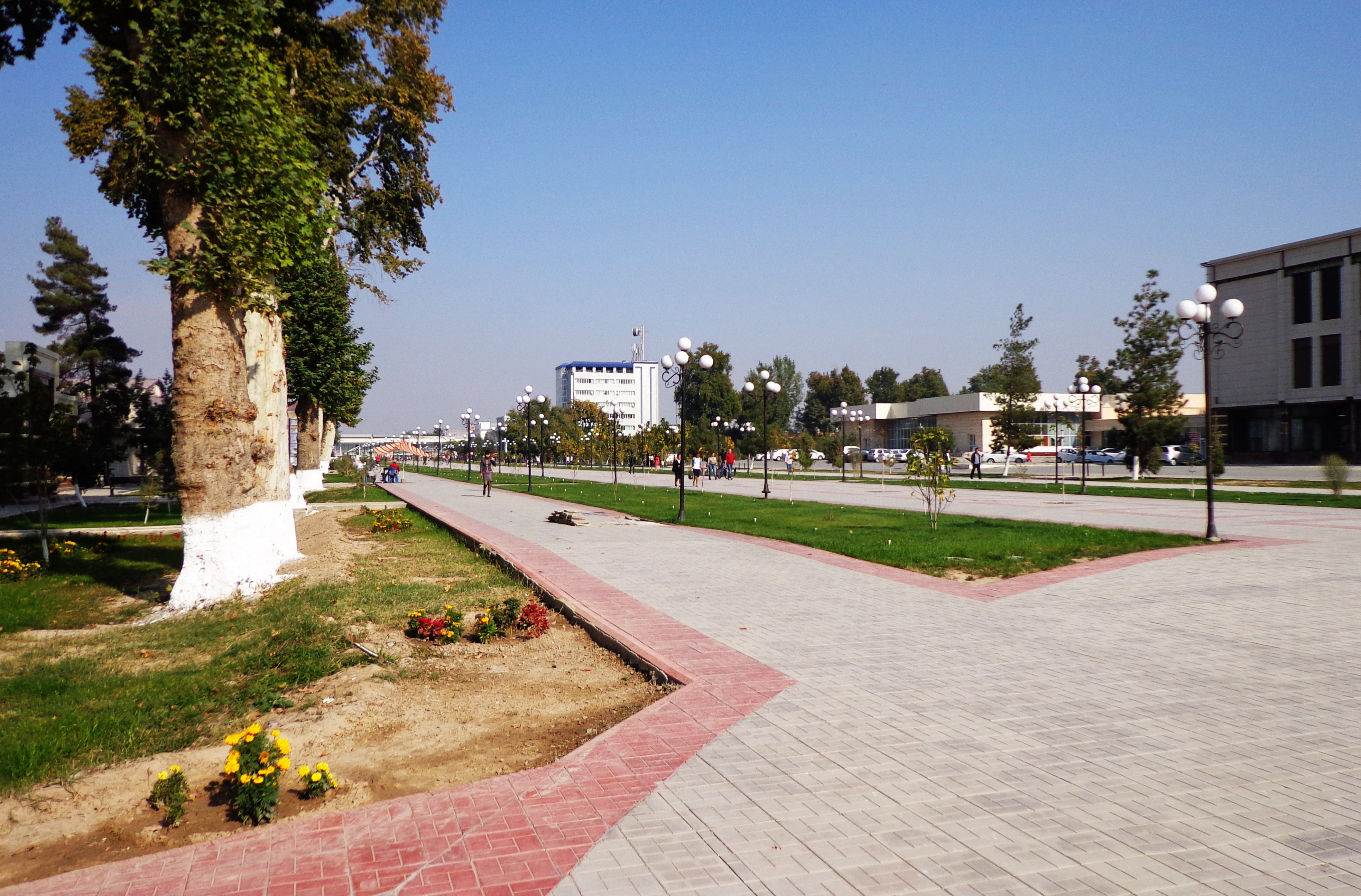 Фергана аллея